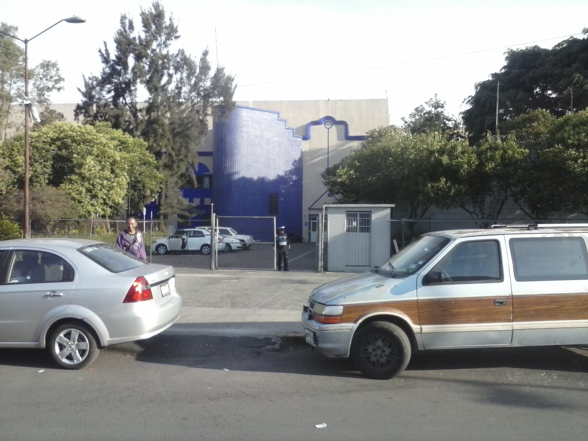 Vista, desde la salida del metro Candelaria de la Ciudad de México, del edificio que por algún tiempo albergó los documentos del Archivo General de Notarías (que tiene su sede definitiva, desde el 14 de julio del 2005, en el ex templo de Corpus Christi, en el Centro Histórico de esa ciudad.)